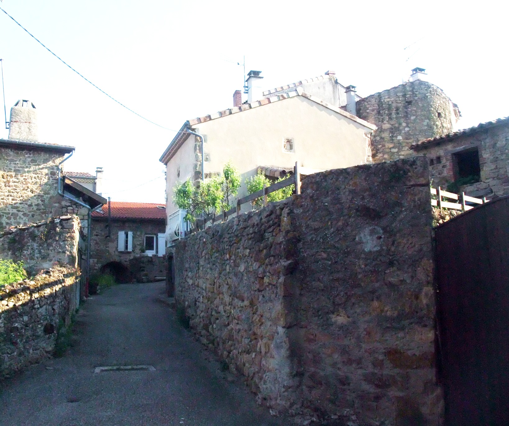 Roiffieux rue des Mûres